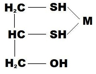 Dimercaprol (quelat del metall M).